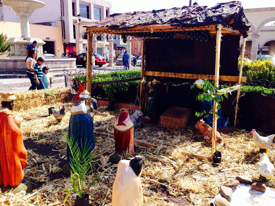 Nacimiento en el Jardín Principal de Uriangato, Gto.